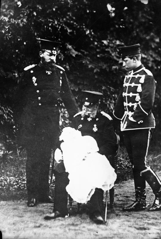 Kaiser Wilhelm I sitzend, Kaiser Friedrich links, Wilhelm II und der Kronprinz in Windeln